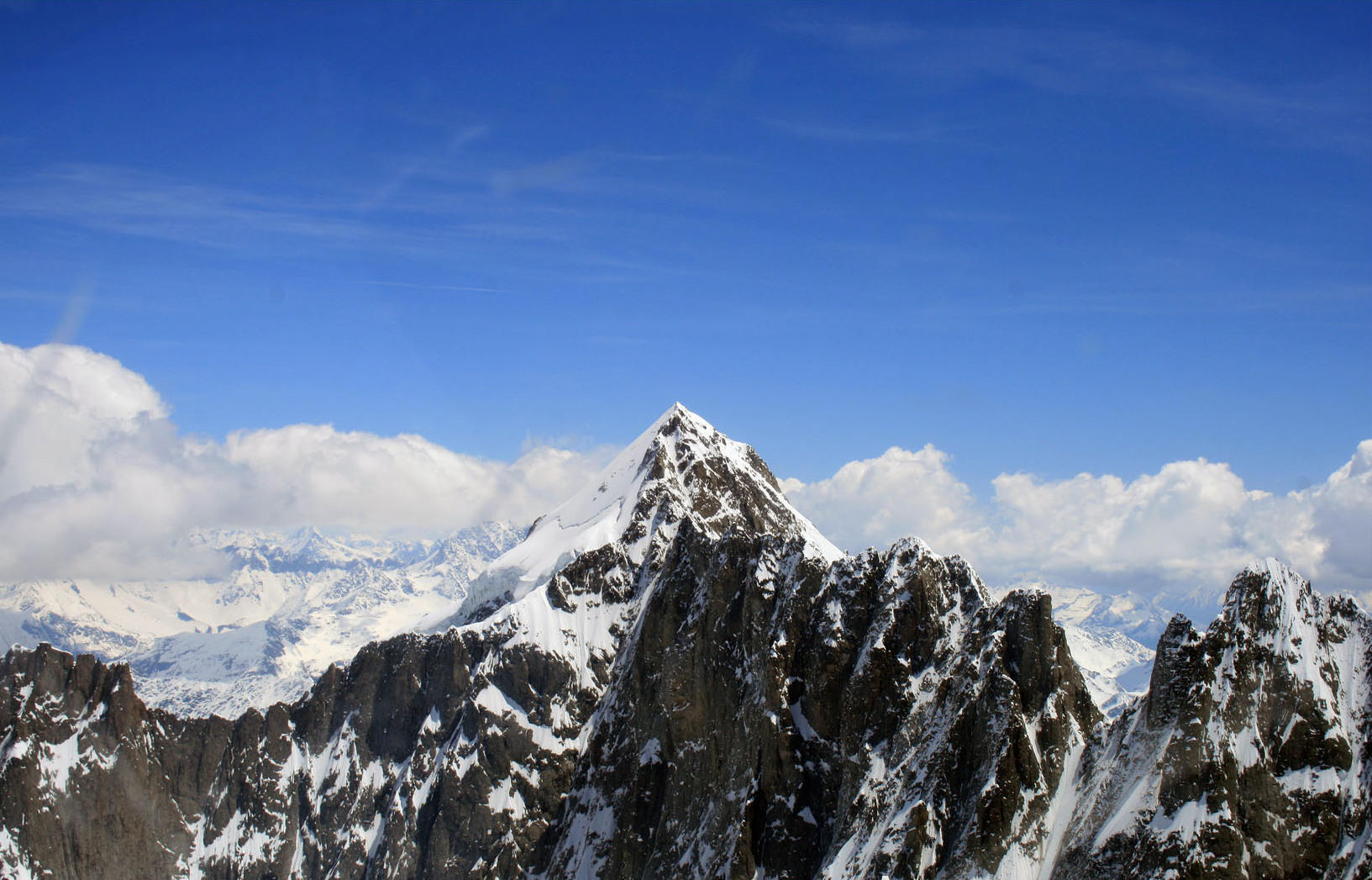 mont dolent